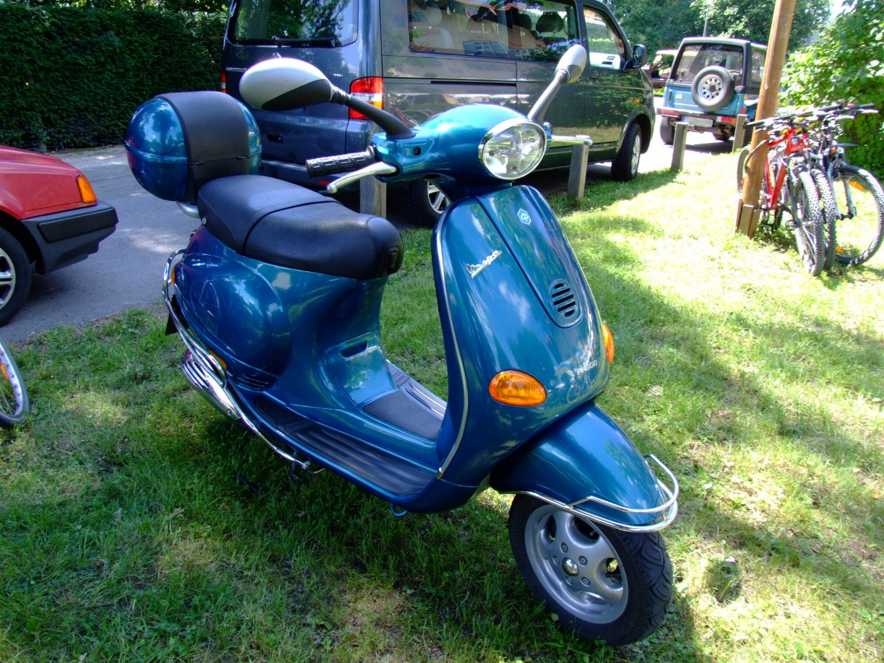 Vespa 125 ET4